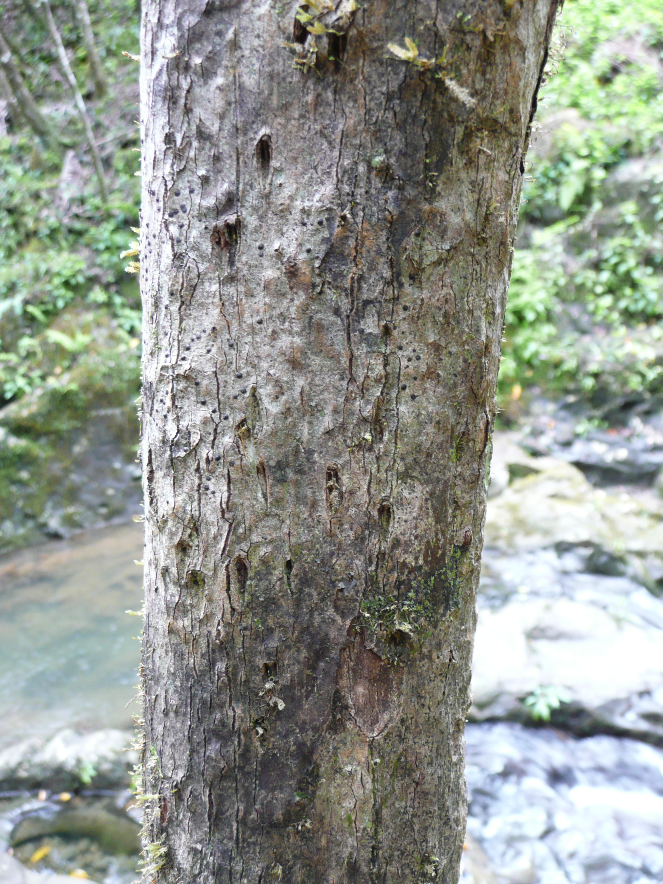 Eugenia bojeri in Vallée de Ferney in Mauritius Map: 20° 21' 45" S 57° 42' 22" E